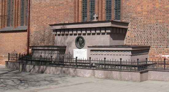 Maironio mauzoliejus, Kaunas.